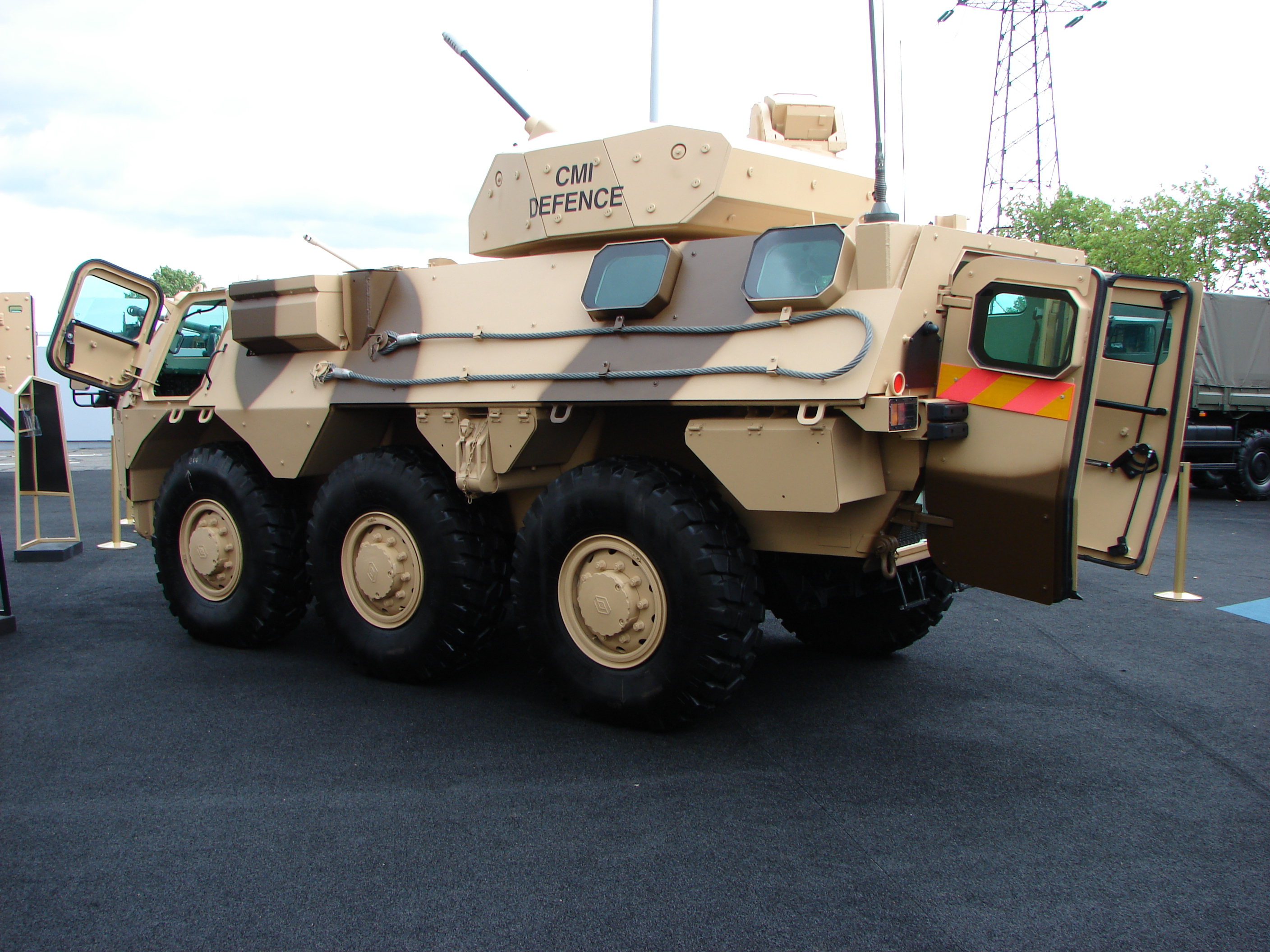 Renault Trucks Defense à Eurosatory 2012